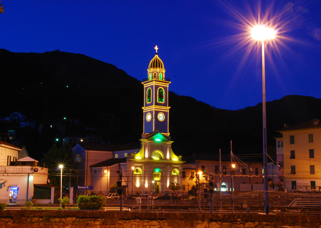 immagine della chiesa parrocchiale di Ronco Scrvia illuminata per i giorni di festa